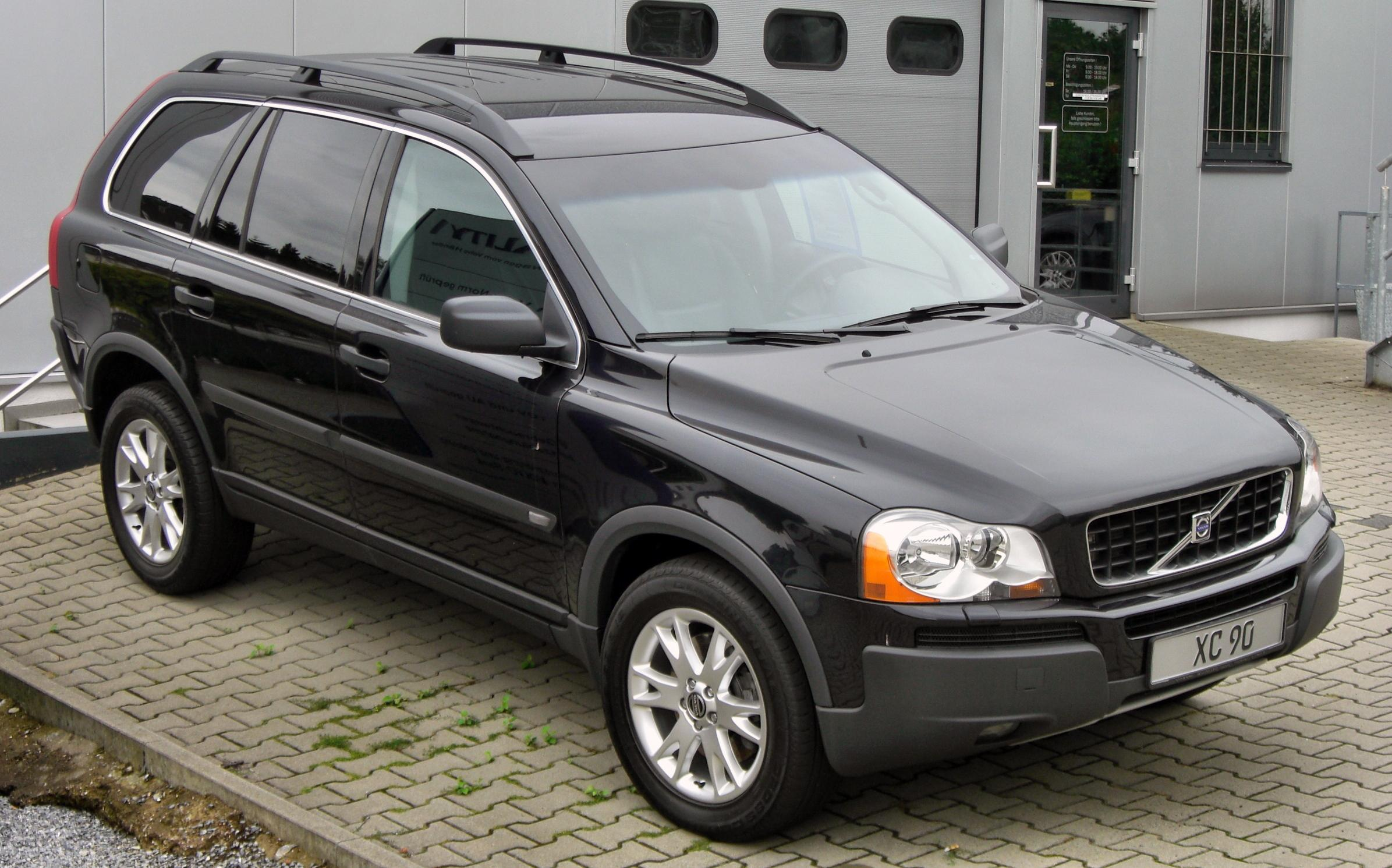 Volvo XC90